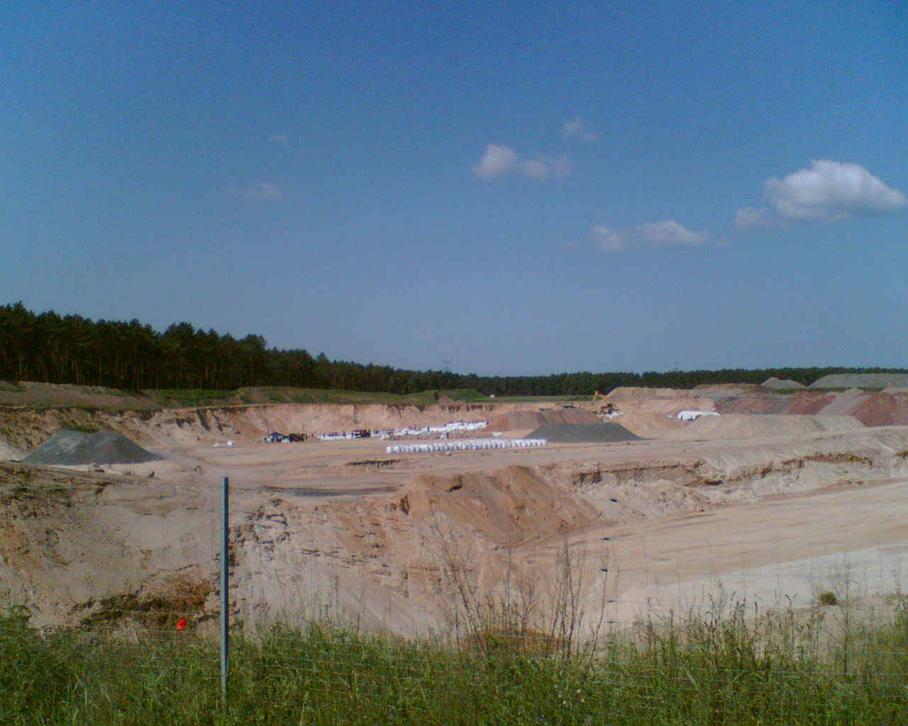 Ansicht der Kiesgrube bei Farsleben von Süden. Im Juni 2013 während der Flut bei Magdeburg wurden in der Kiesgrube Farsleben Sandsäcke und Bigbags befüllt.